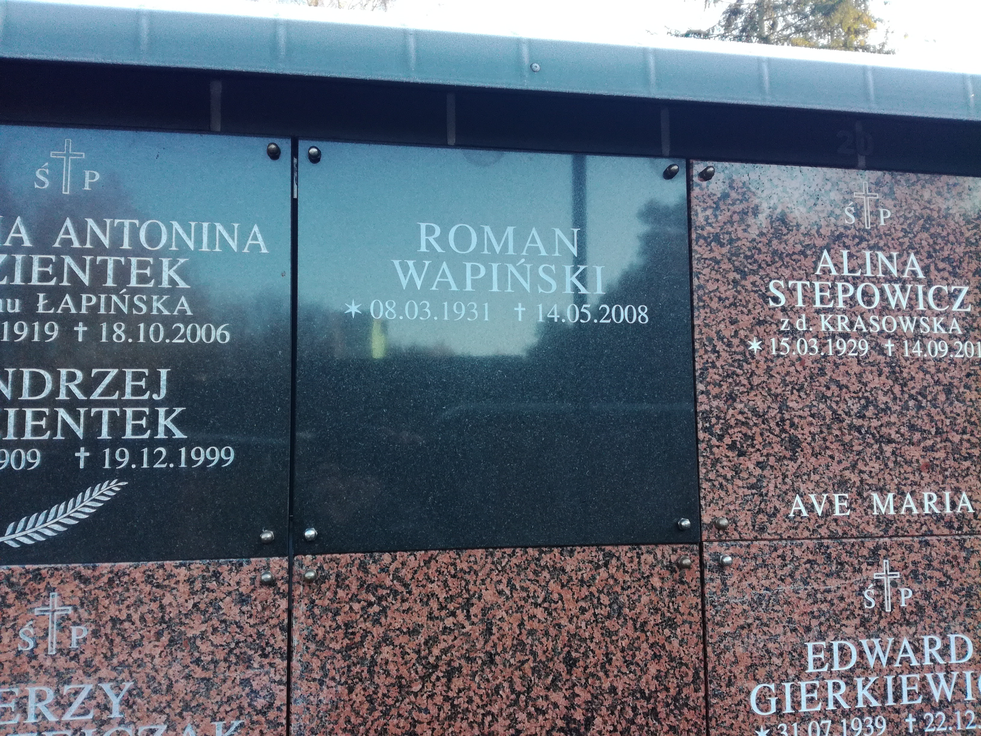 Nisza cmentarna historyka prof.Romana Wapińskiego w kolumbarium cmentarza Srebrzysko w Gdańsku Wrzeszczu.